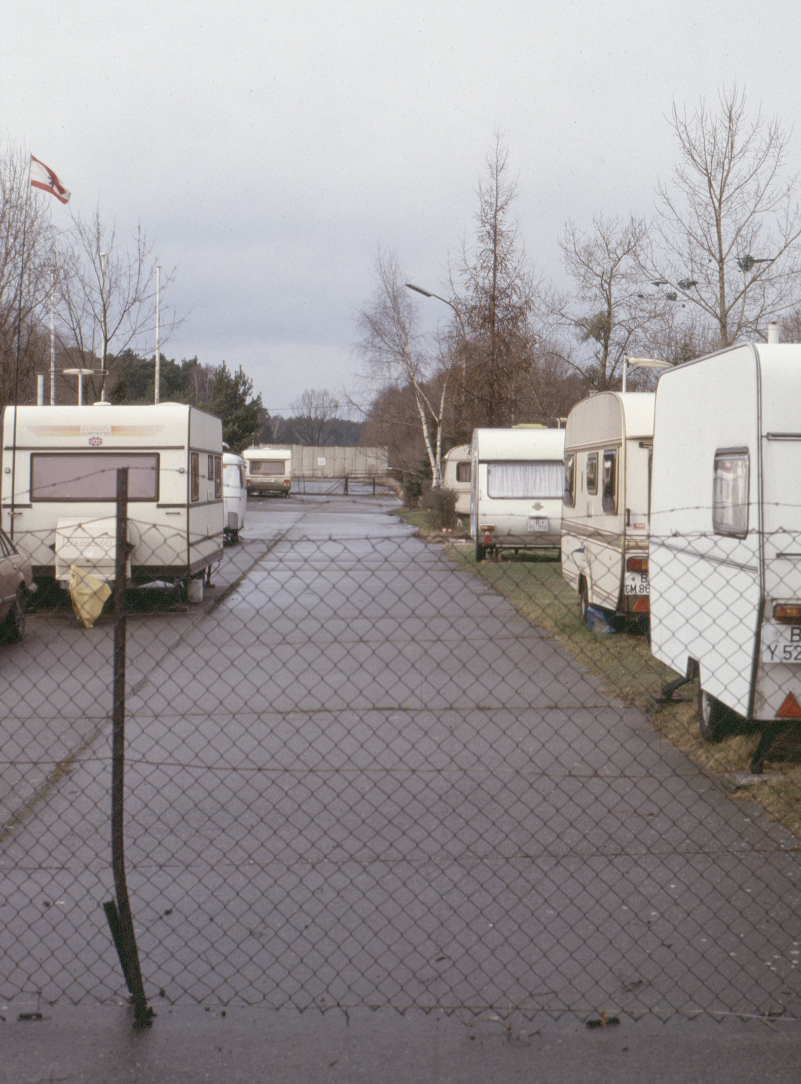 Albrechts Teerofen, Campingplatz auf der Autobahntrasse